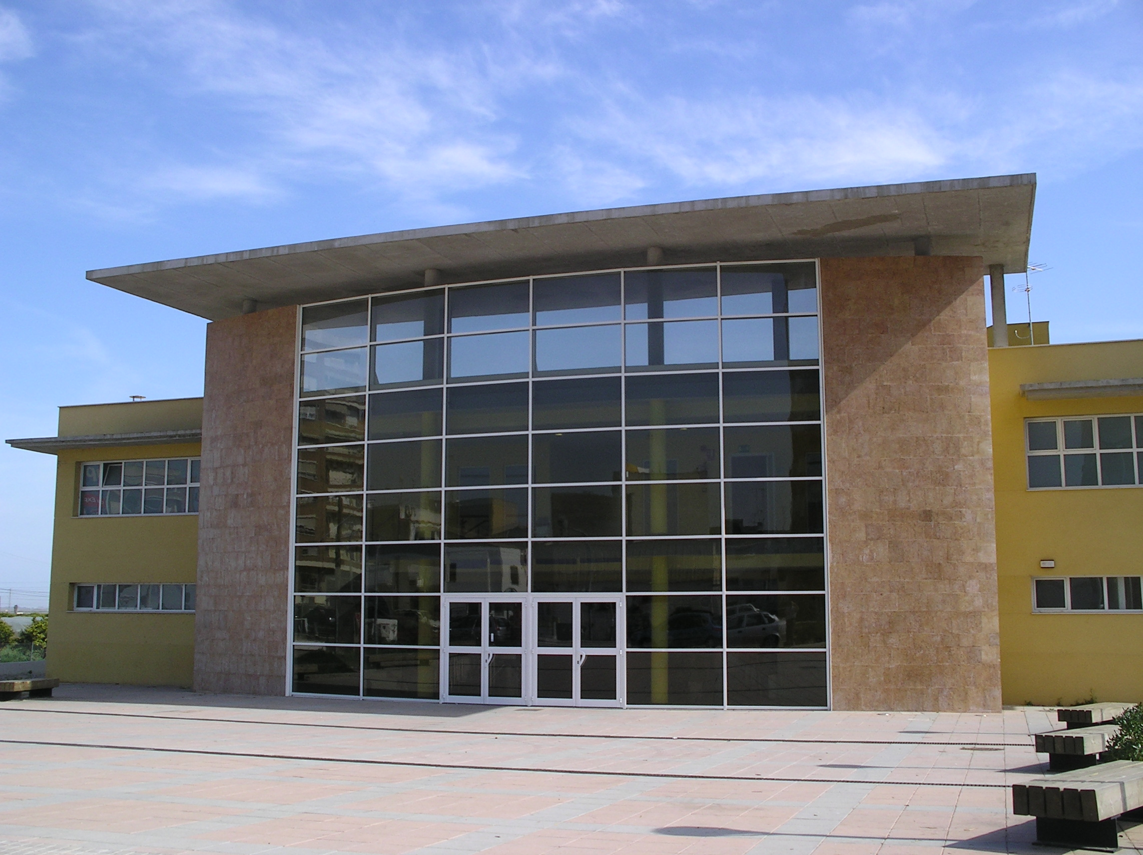 Vista de la piscina municipal de Silla, Valencia, España